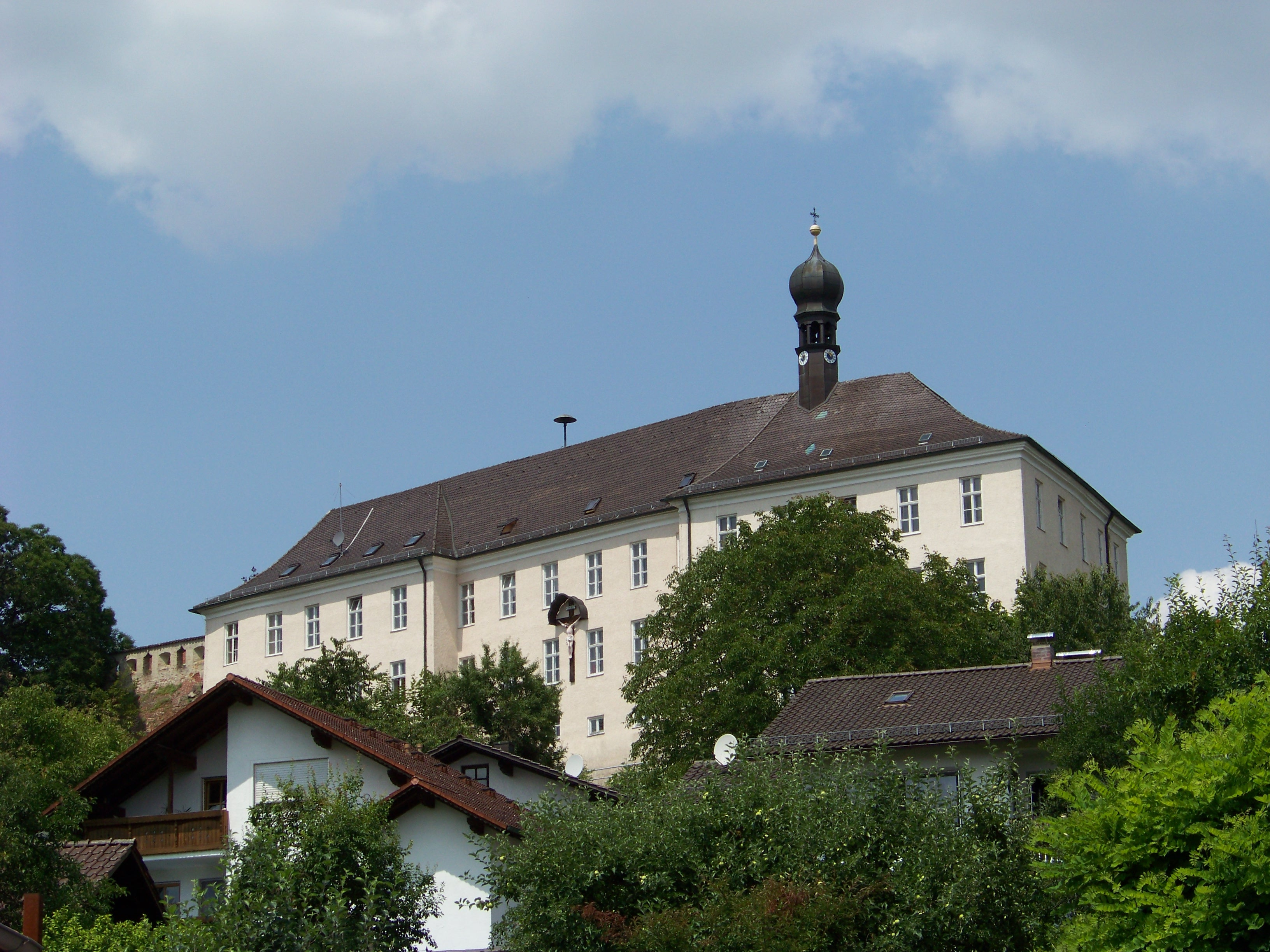 Marklkofen, Poxau, Kosterstraße 25. Ehem. Schloss. Ehem. Kloster der Armen Schulschwestern (1857- 2006), dreigeschossige Walmdachbauten um Fünfeckhof in beherrschender Hochlage, 1710, im Nordwestteil Mauerteile aus der 1. Hälfte 16. Jahrhundert, katholische Schlosskapelle St. Karl Borromäus im südöstlichen Trakt, 1710; mit Ausstattung; Hanggärten als grüne Sockelzone der Anlage; mit Backsteinmauer als Umfriedung.